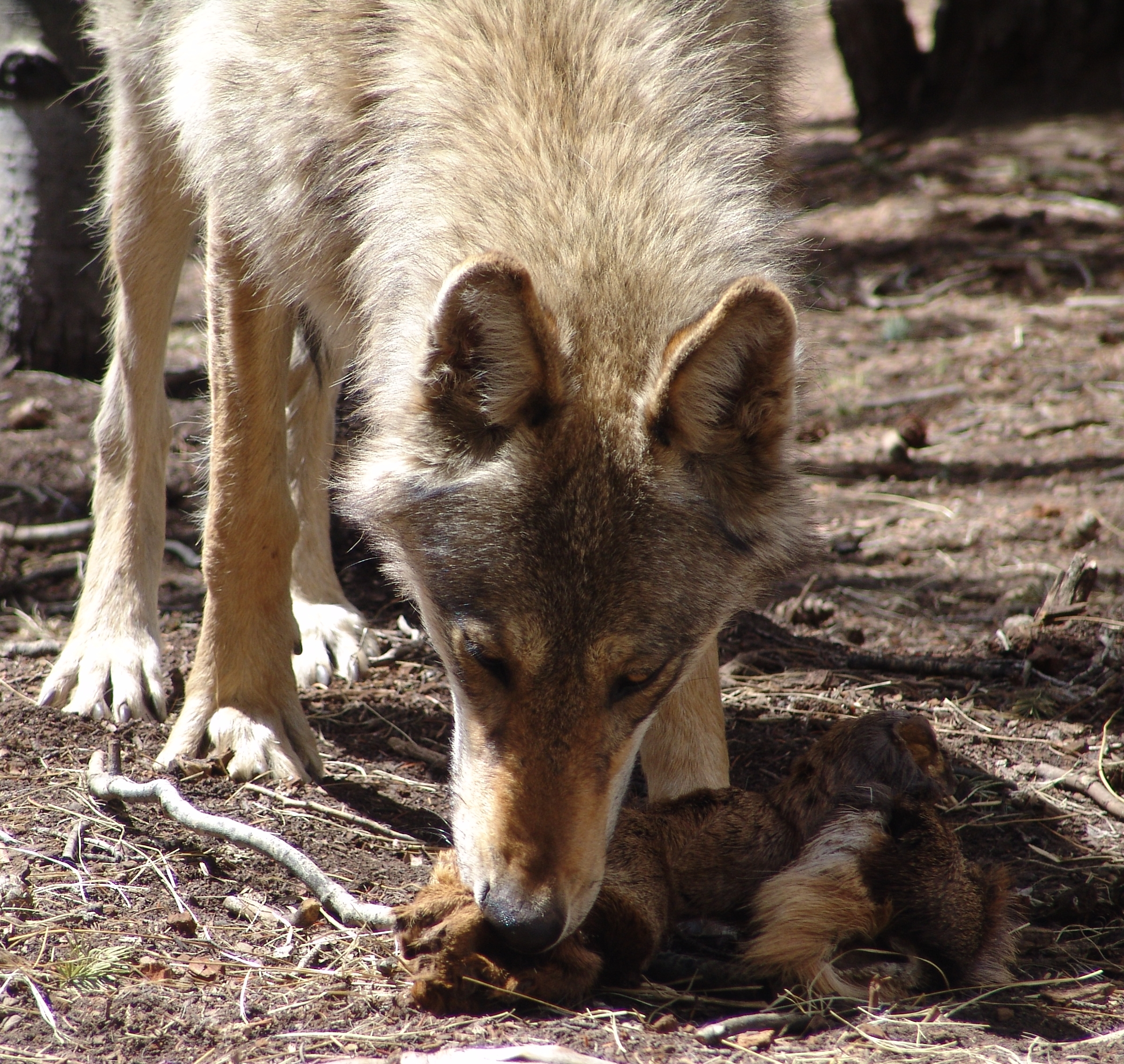 Colorado Wolf and Wildlife Divide CO.